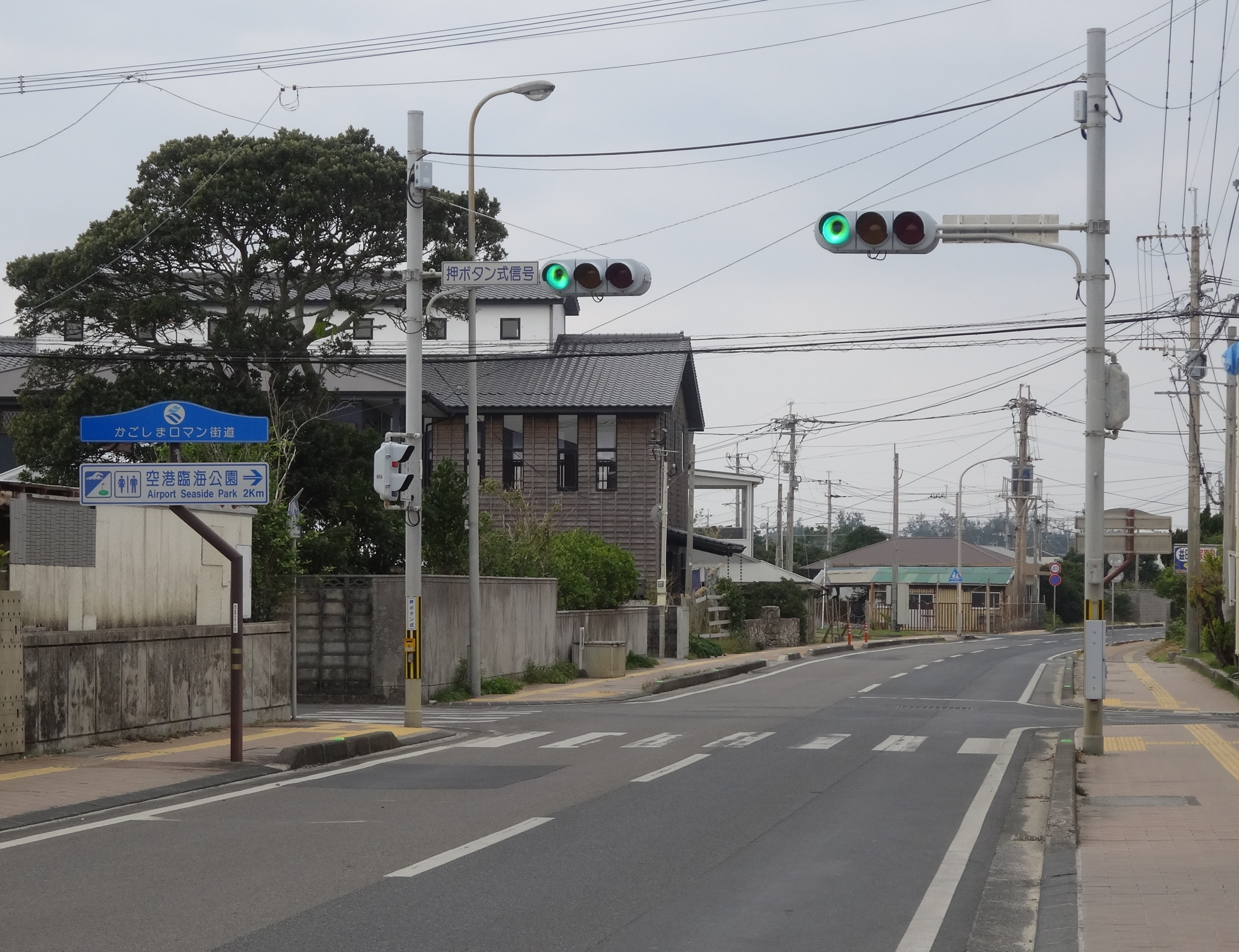 喜界町湾にある島唯一の信号機